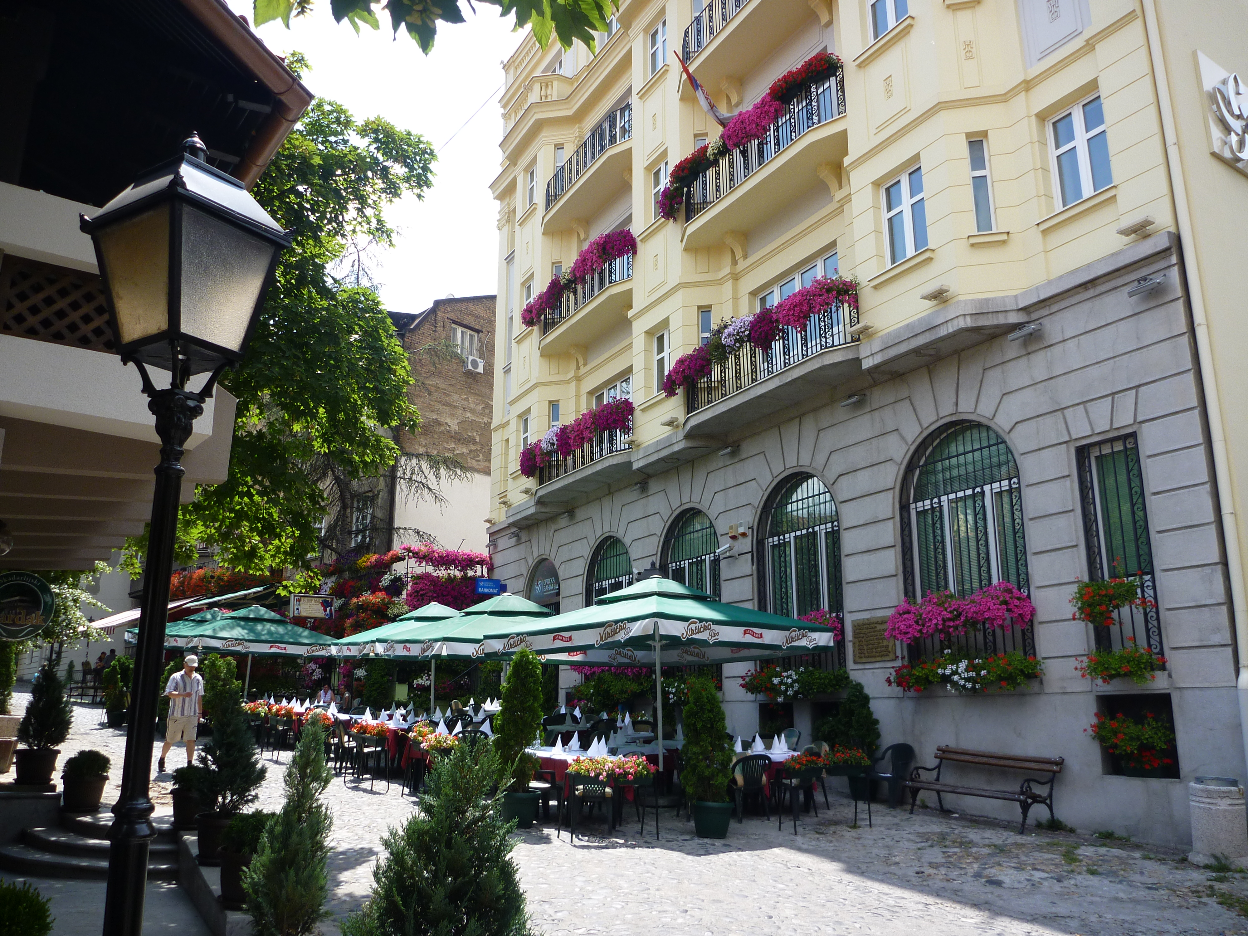 Skadarlija-Beograd